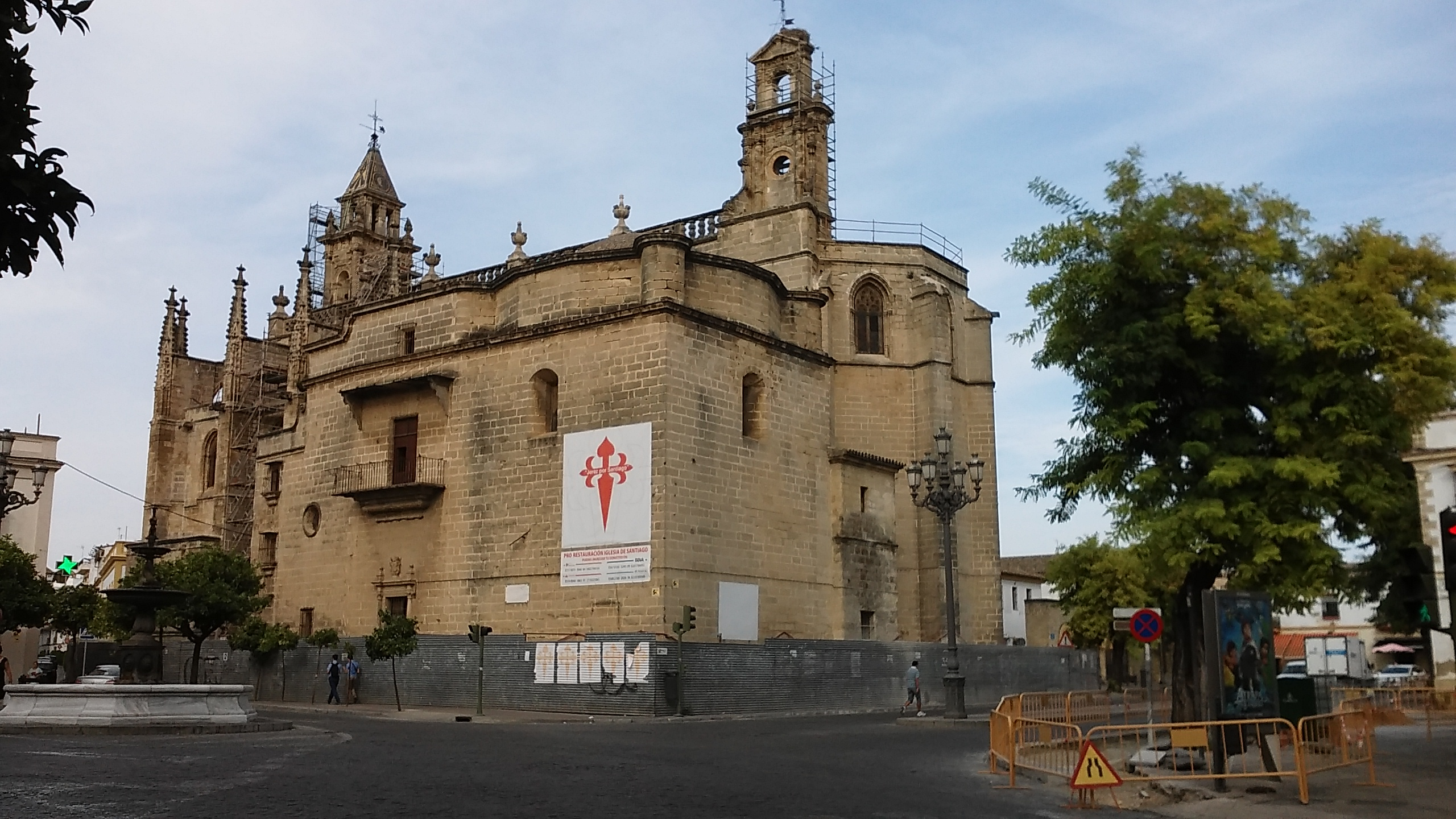 Iglesia de Santiago en obras (Jerez, España)